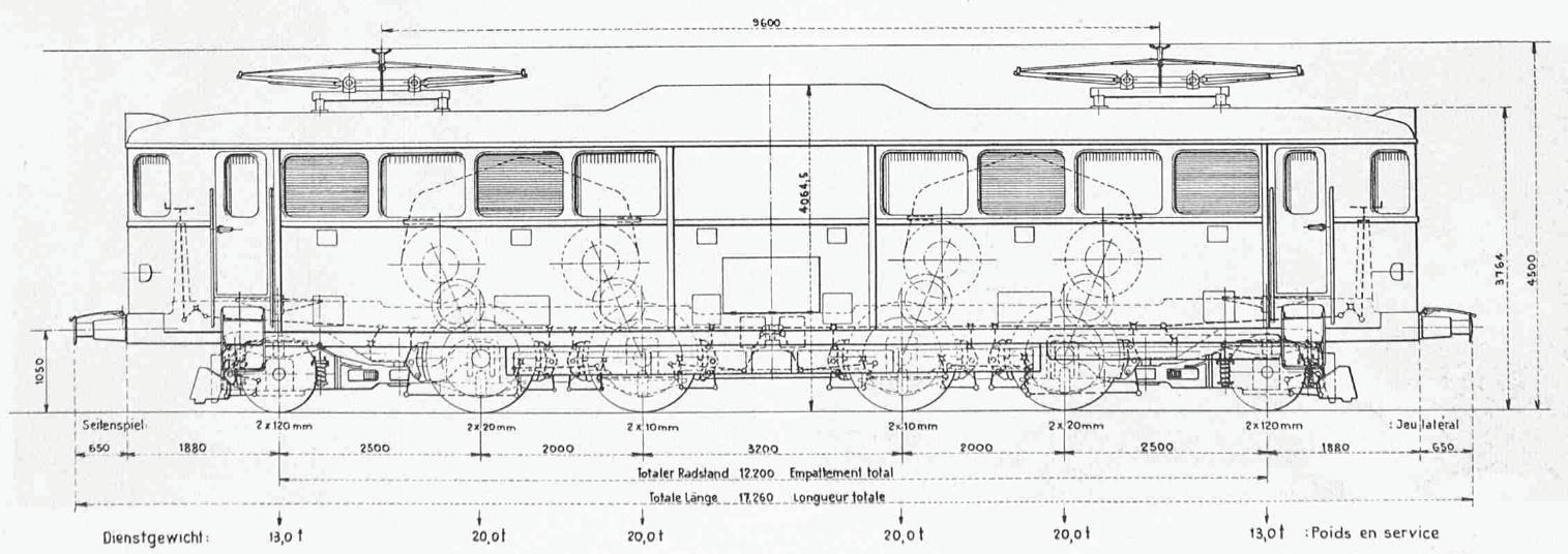 Typenskizze der Ae 4/6 der SBB, gebaut 1941 von SLM, BBC, MFO und SAAS